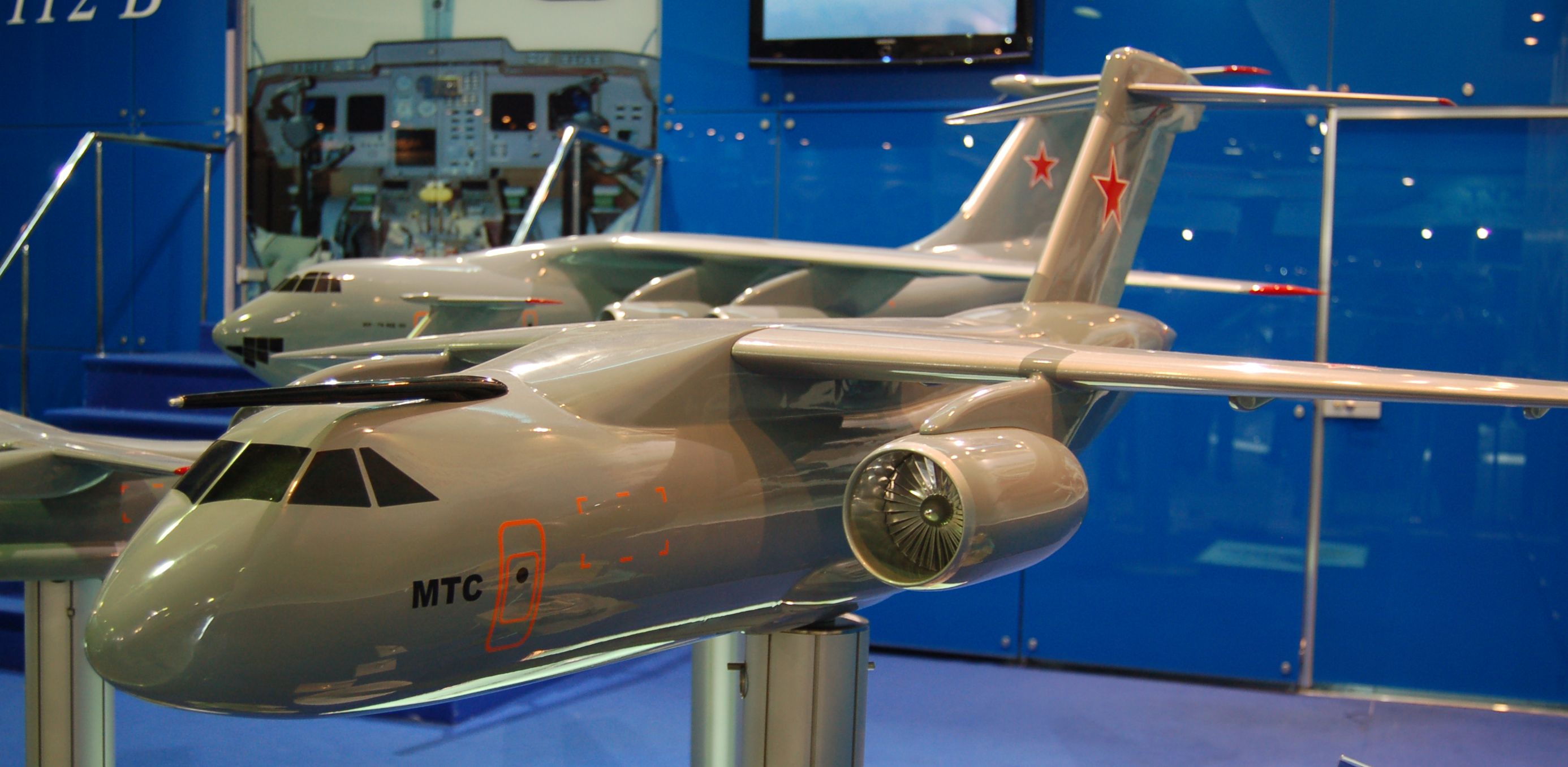 Макет многоцелевого транспортного самолёта (МТС). Ил-214. МАКС-2009